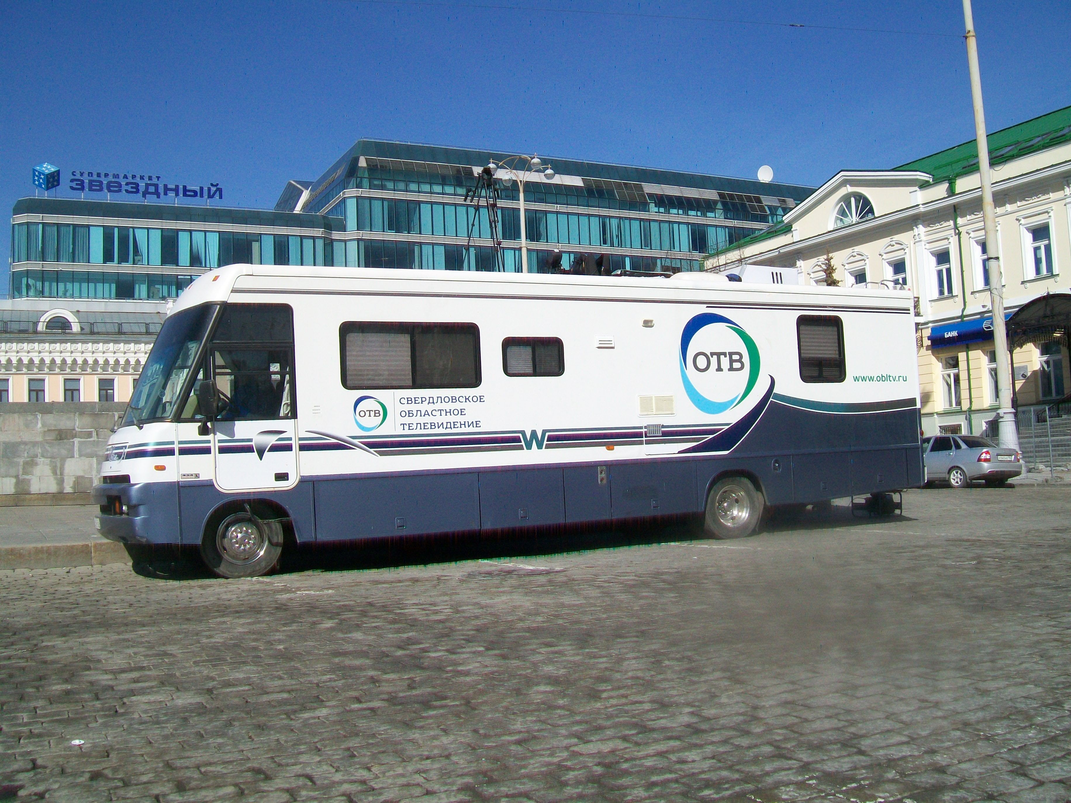 Автобус ОТВ на Первомае в Екатеринбурге, 1 мая 2017 года